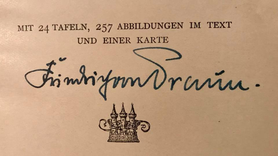 Eigenhändige Eigentümerkennzeichnung/Unterschrift eines Buches "Friedrich von Braun"